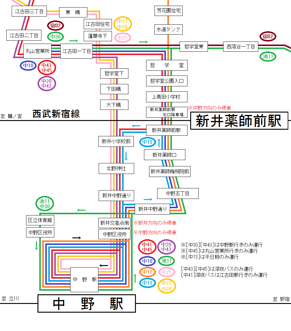 関東バス丸山営業所管内の中野駅周辺路線図 （停留所誤記を修正）